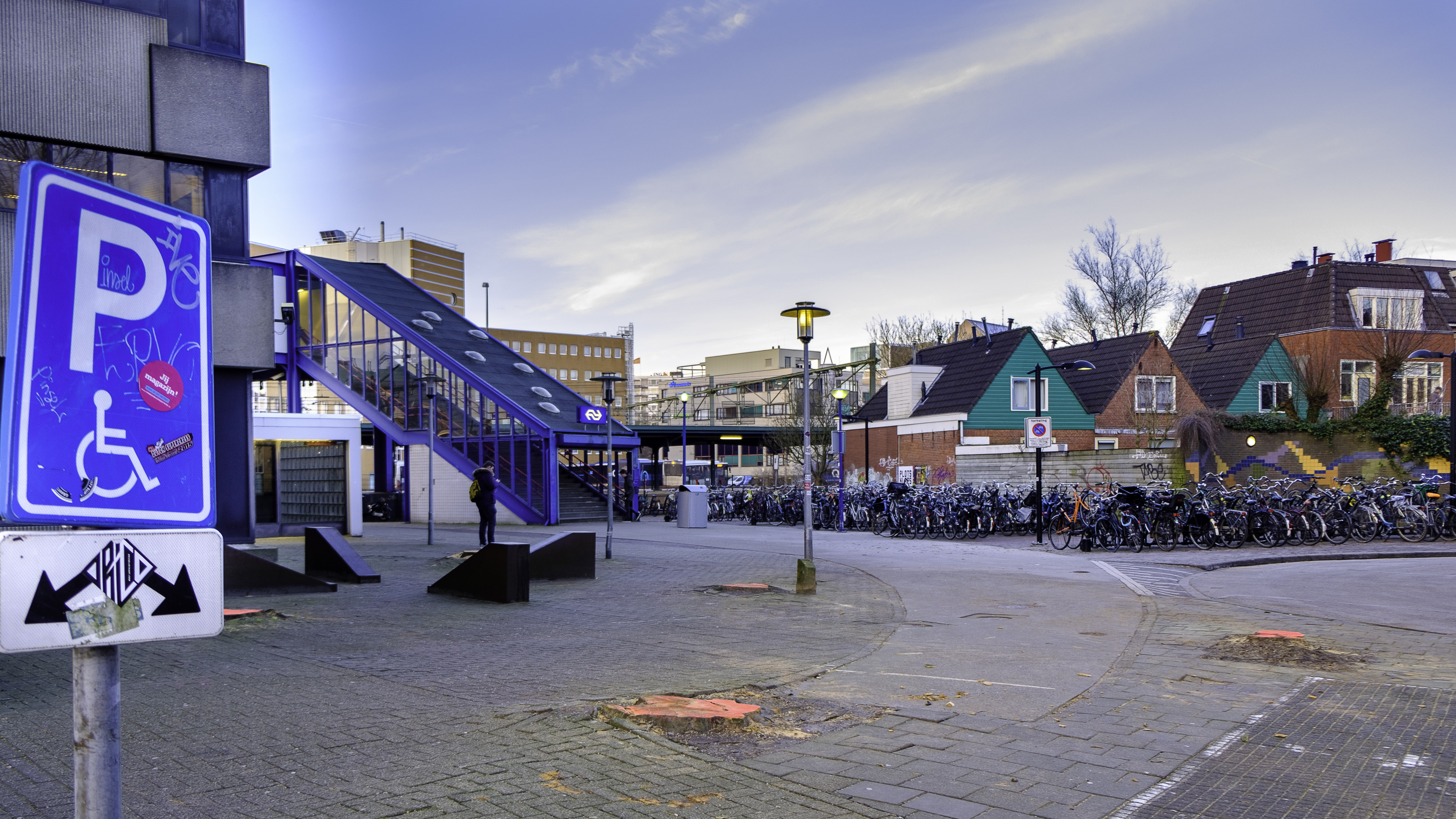 zuidelijke stationsingang van Groningen